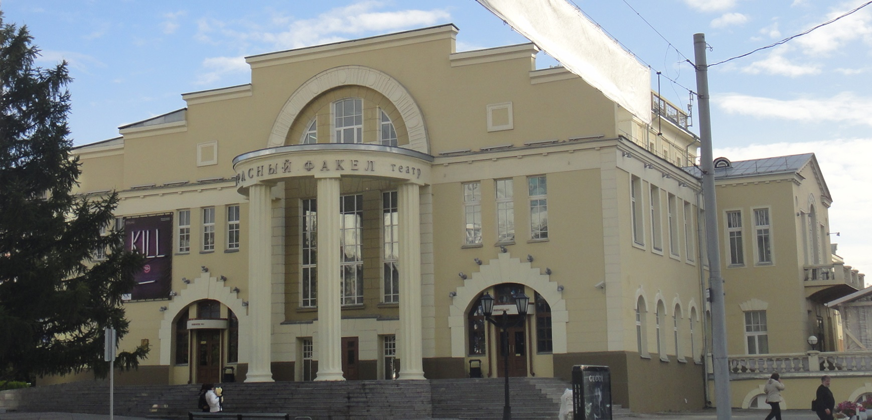 Новосибирский драматический театр «Красный факел»